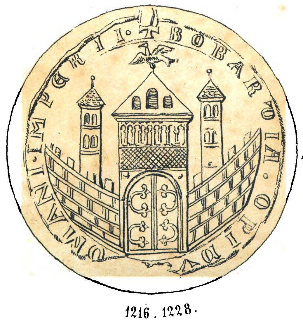 Abdruck des Stadtsiegel von 1216 der Stadt Boppard